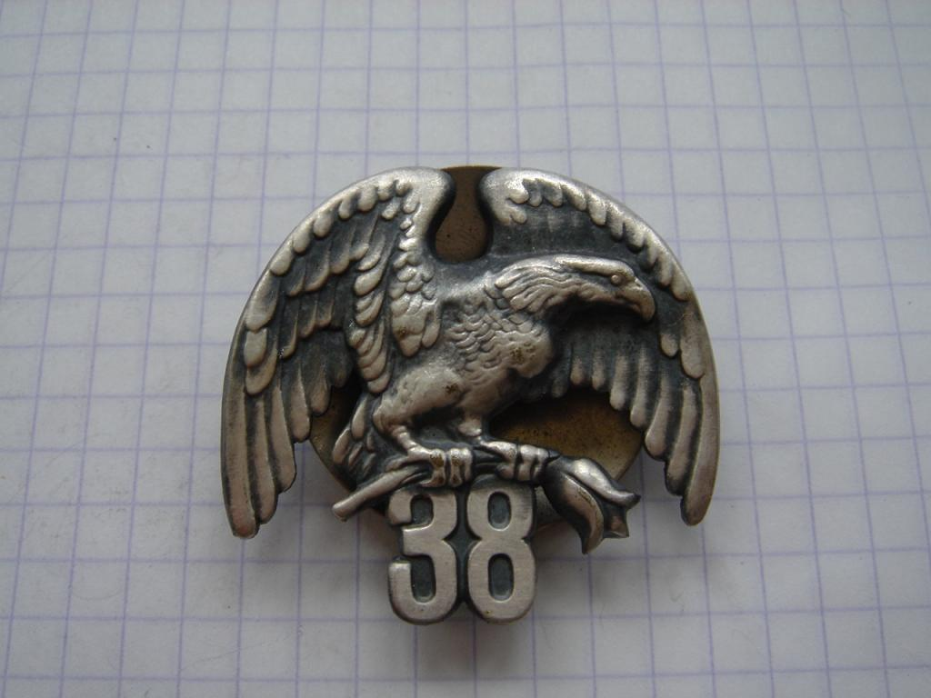 D ctht,ht